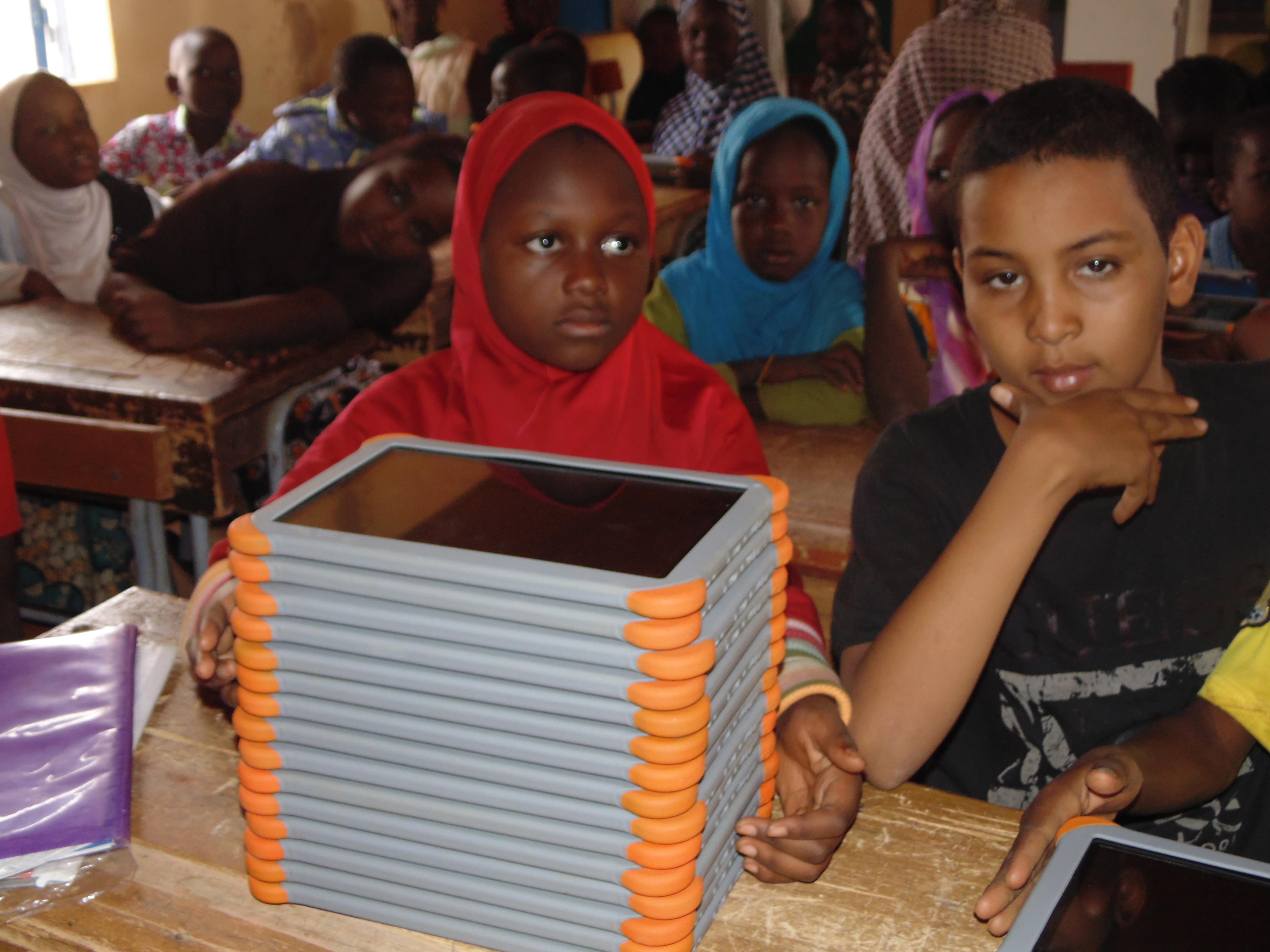 Préparation de cours avec les tablettes numériques